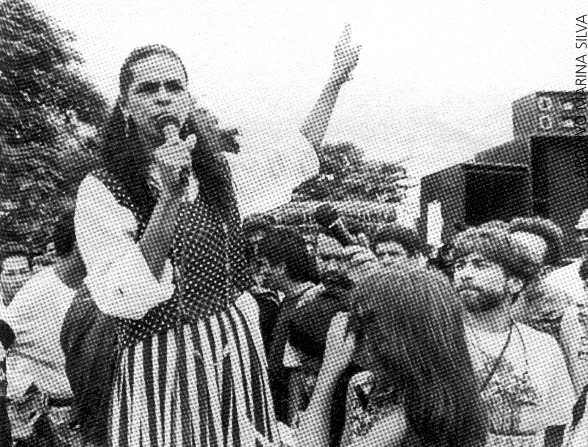 Marina na militância Acre (1994)